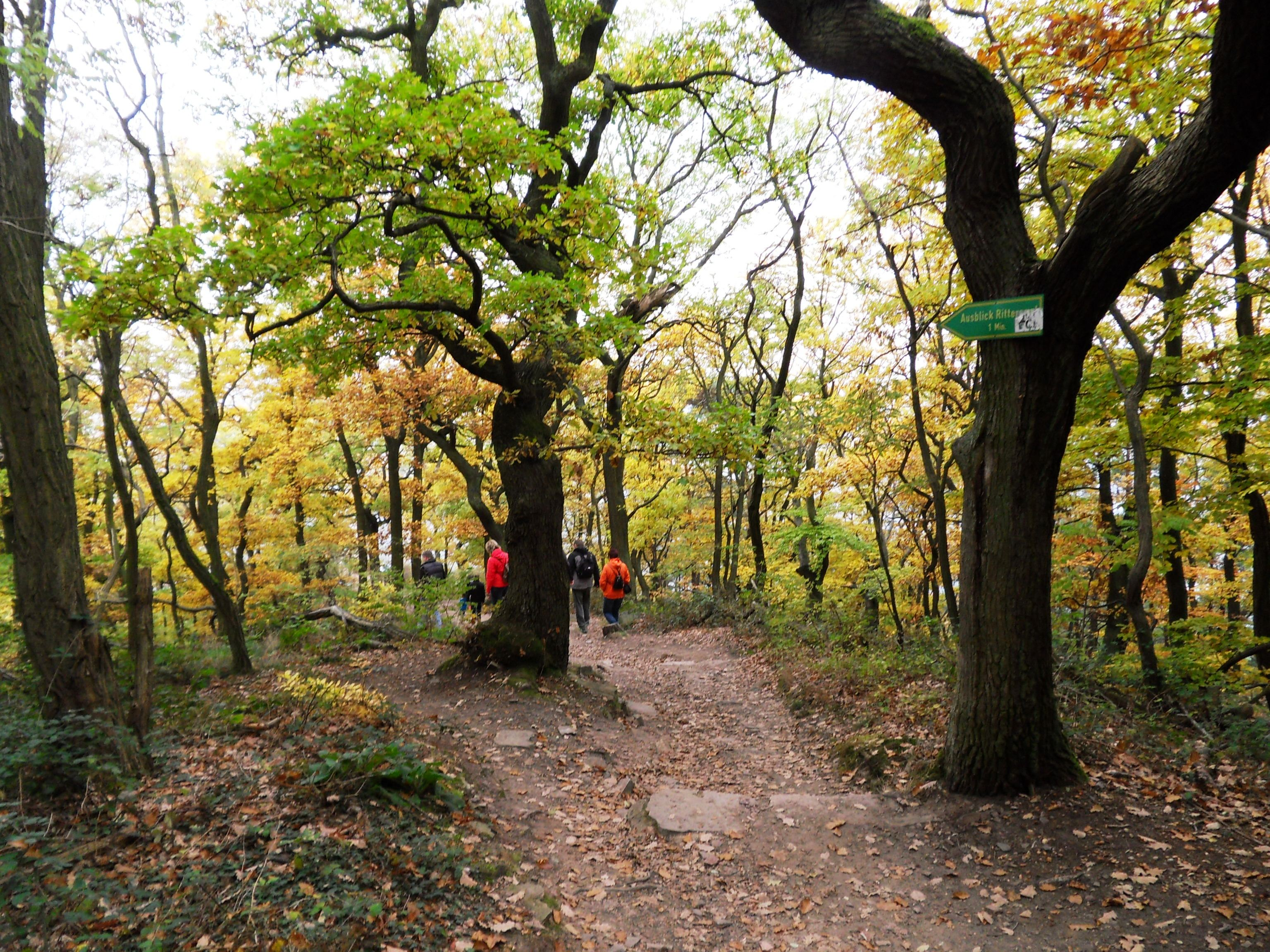 Zugang zum Aussichtspunkt Rittersaal im Landschaftspark Niederwald bei Rüdesheim im Herbst; Bereich im Naturschutzgebiet „Niederwald bei Rüdesheim“